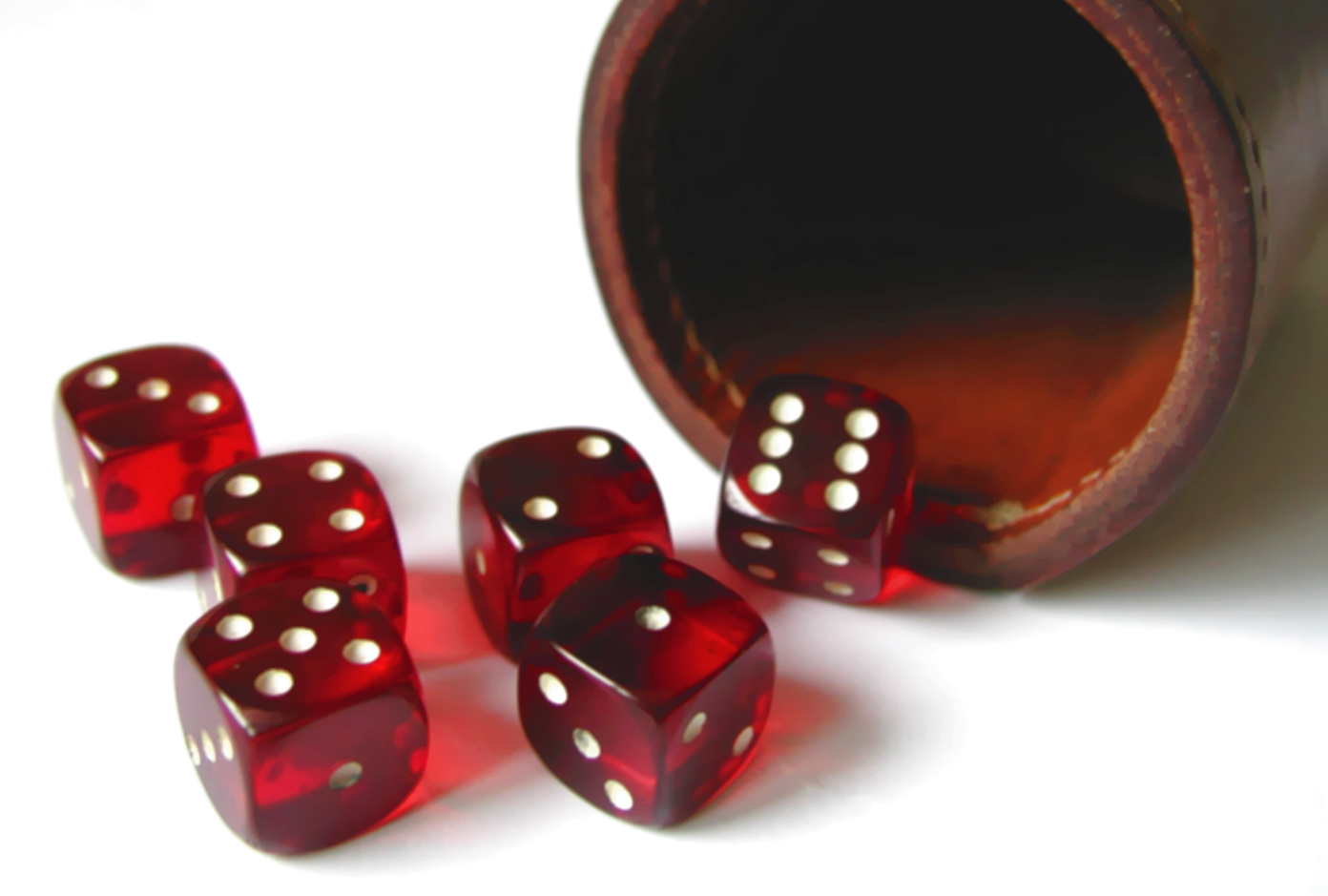 Alle fünf Würfel samt Becher für einen Versuch